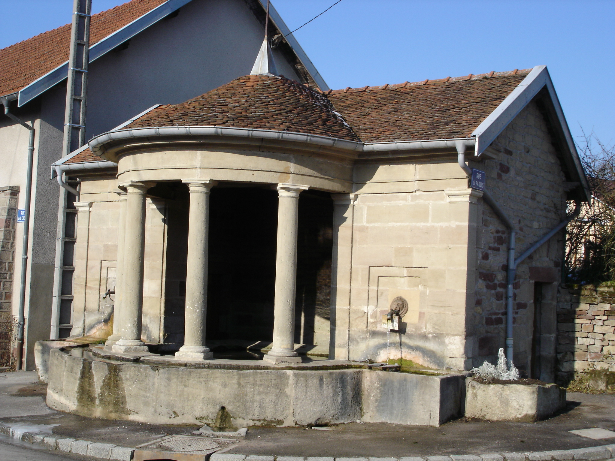 Fontaine à Viviers-le-Gras (Vosges)